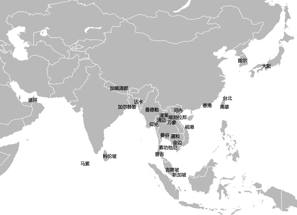 巫家坝机场通航国际城市